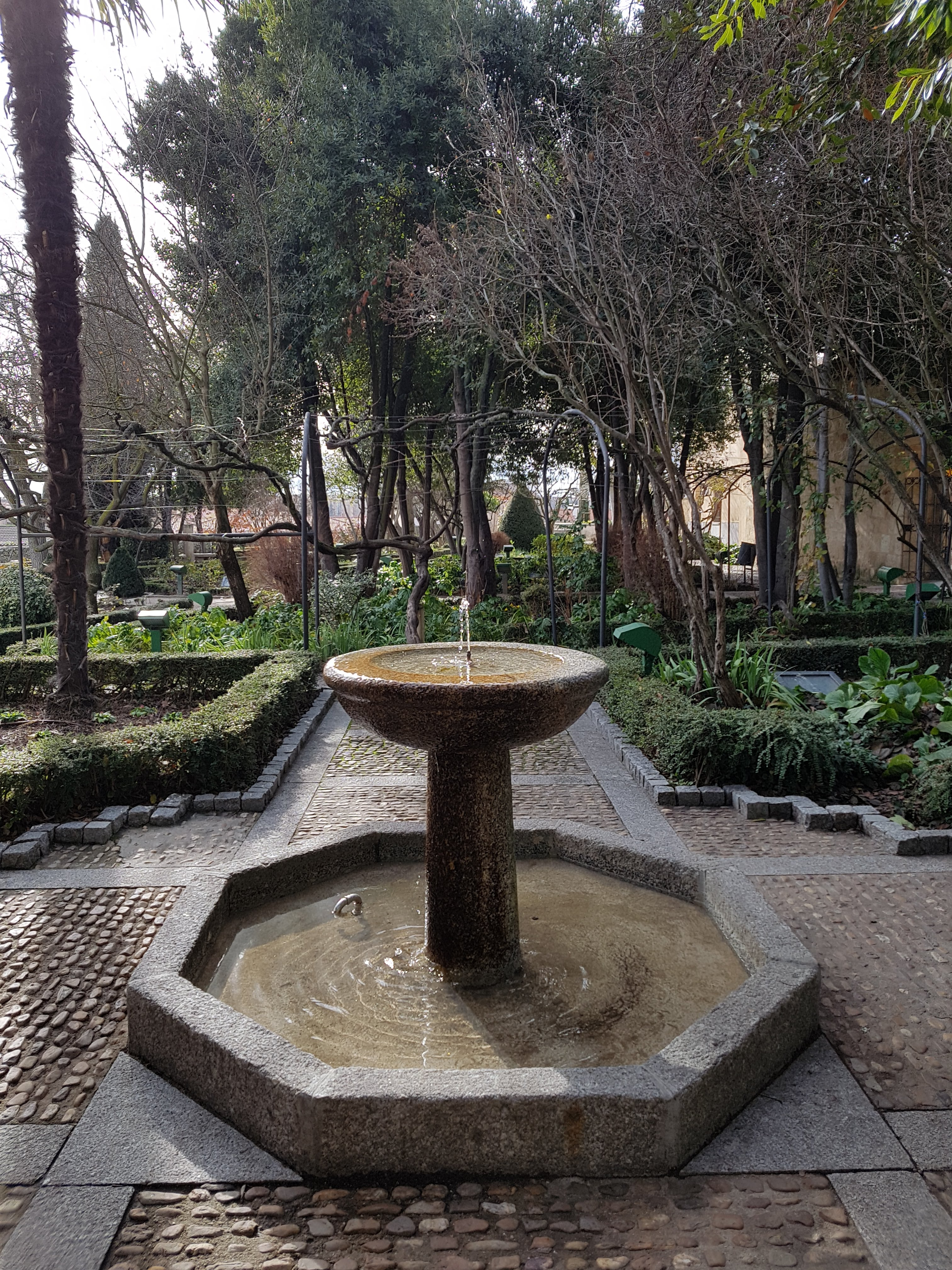 Detalle de la parte antigua.